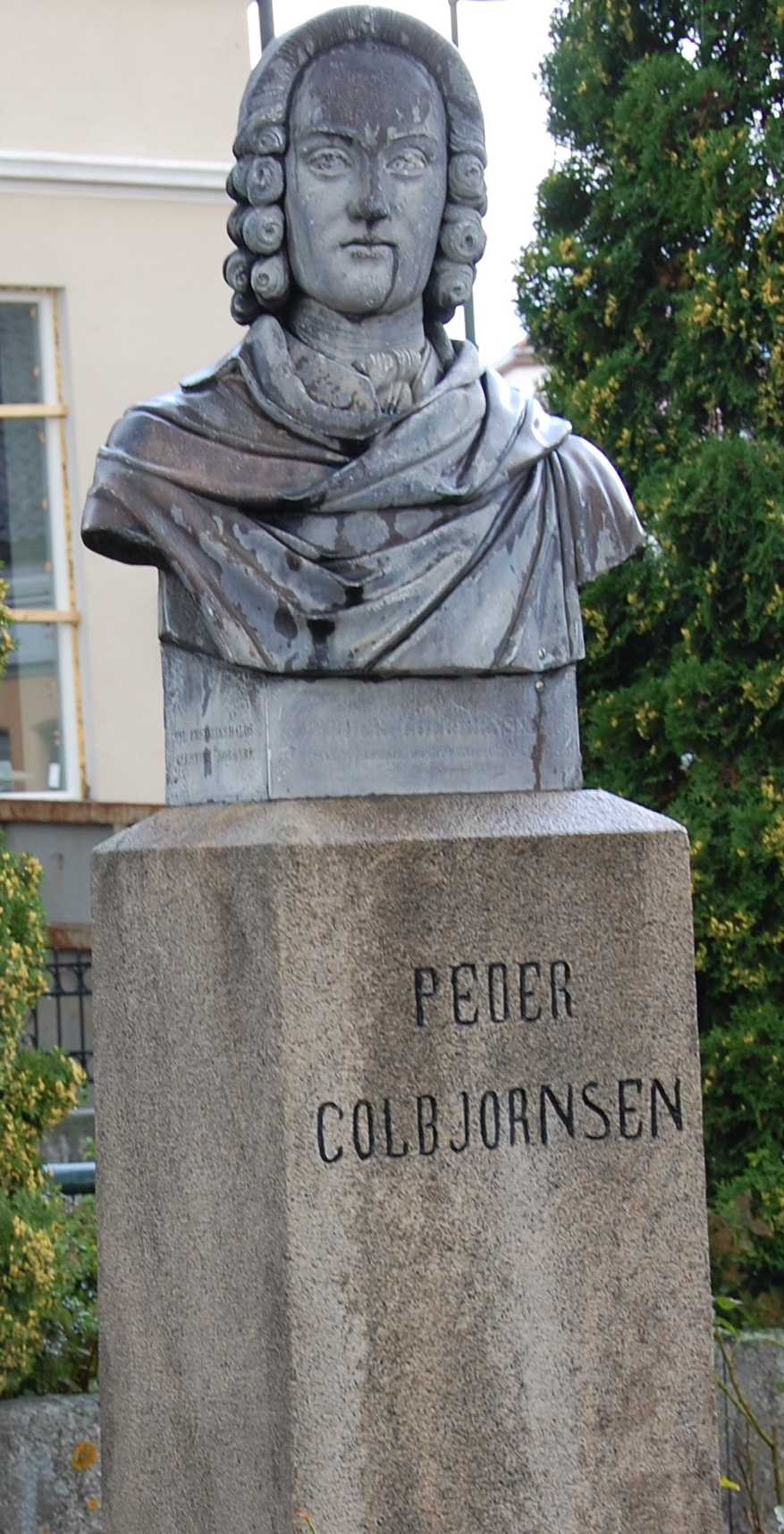 Peder Colbjørnsen-bysten i Halden. Skulptur av Peder Colbjørnsen (1683-1738), krigsminnesmerke. Den er plassert i sydenden av Svenskegata, i Storgata, rett ved Rådhuset. Selve bysten er laget av Hans Michelsen og den ble avduket i 1856. Innskrift:Peder Colbjørnsen Saa Stride de Nordmænd for Norge Til Fredrikshalds gestfrie Borgere Fra Deltagerne i Sangfesten 1856. På sokkelen står: Peder colbjørnsen